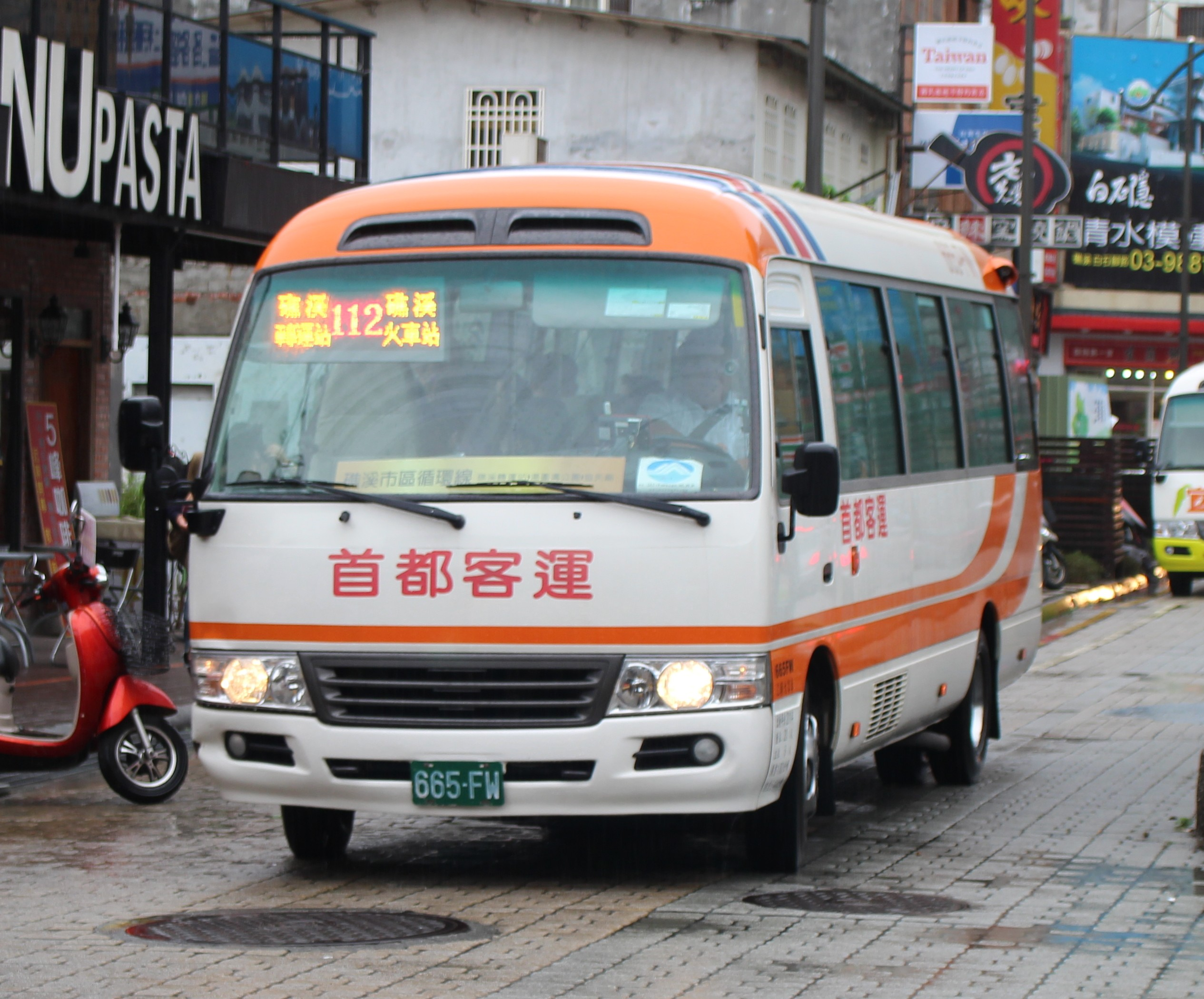 中文（台灣）: 首都客運2012年豐田Coaster中型巴士665-FW，雨中行駛宜蘭勁好行112線。